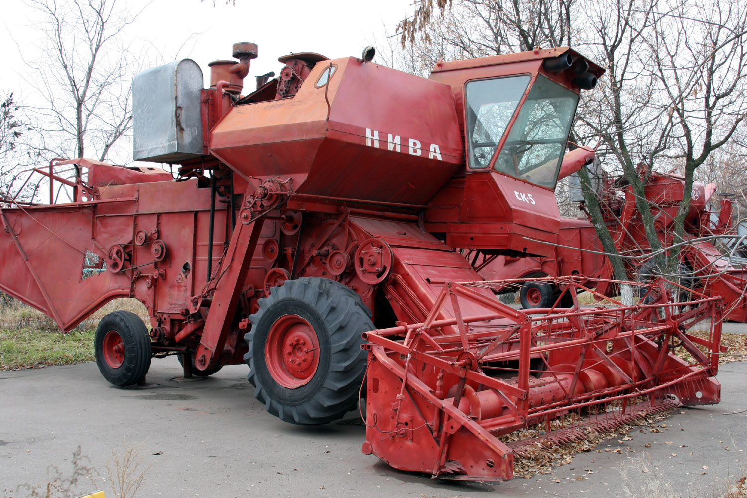 Комбайн СК-5 в Саратове на Соколовой горе